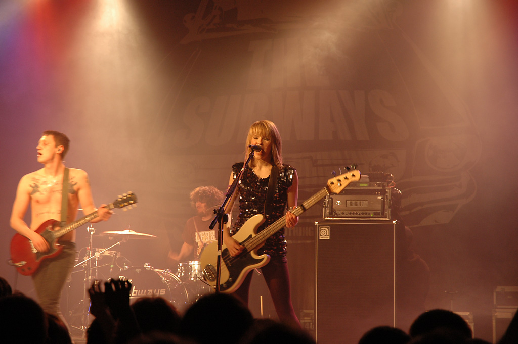 Zdjecie wykonane podczas koncertu w Polsce, w klubie studenckim "Stodoła"